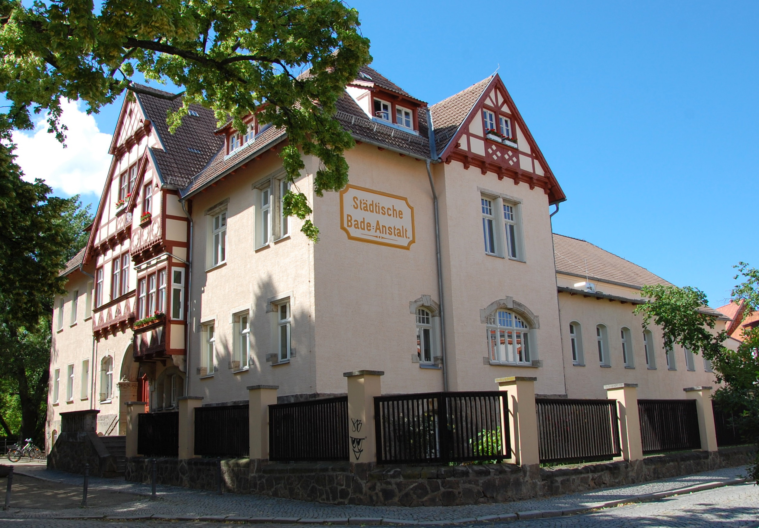 Haus GutsMuthsstraße 6 in Quedlinburg